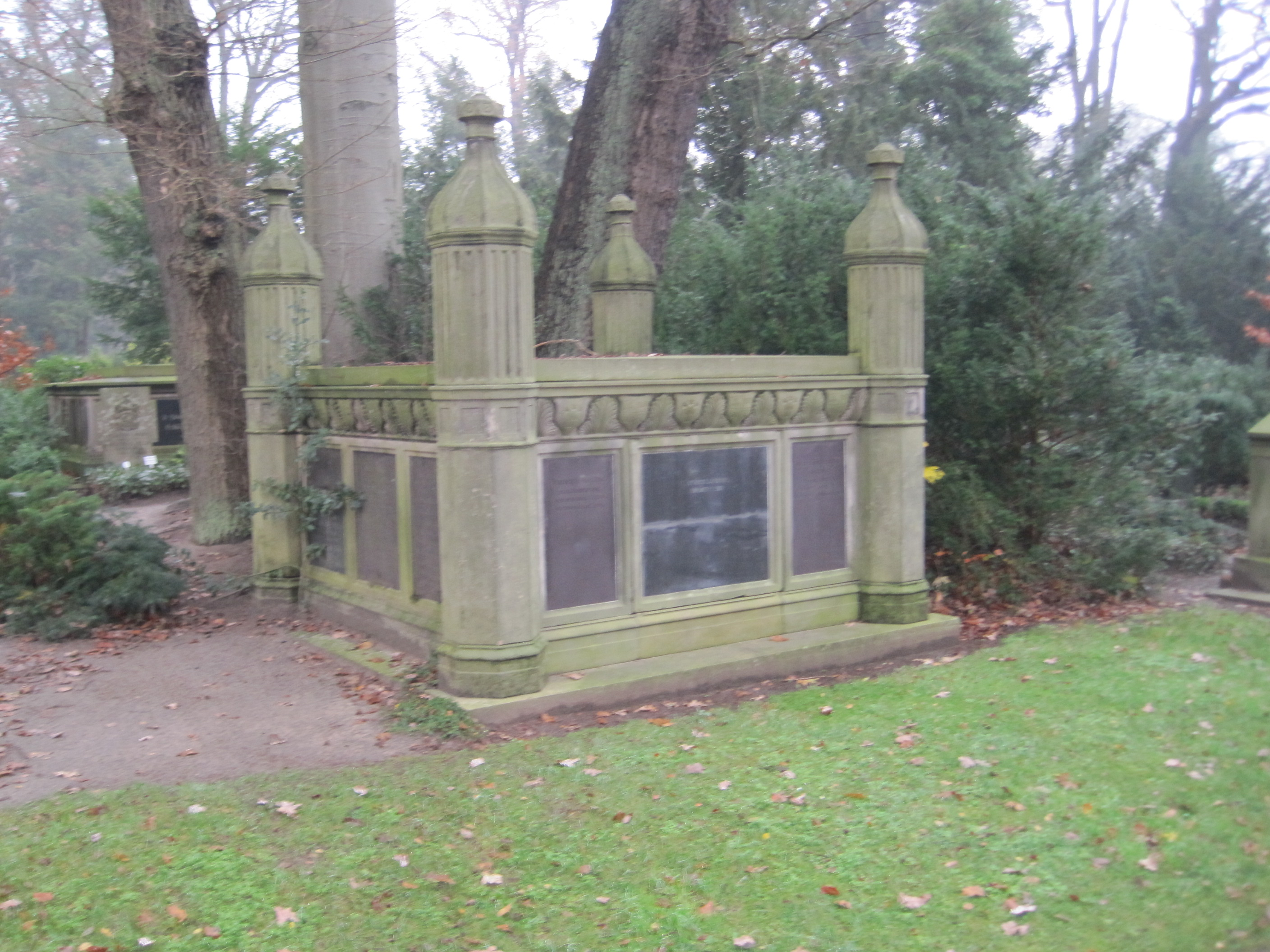 Familienbegräbnis des Lübecker Bürgermeisters Friedrich Nölting (1759-1826) auf dem Burgtorfriedhof